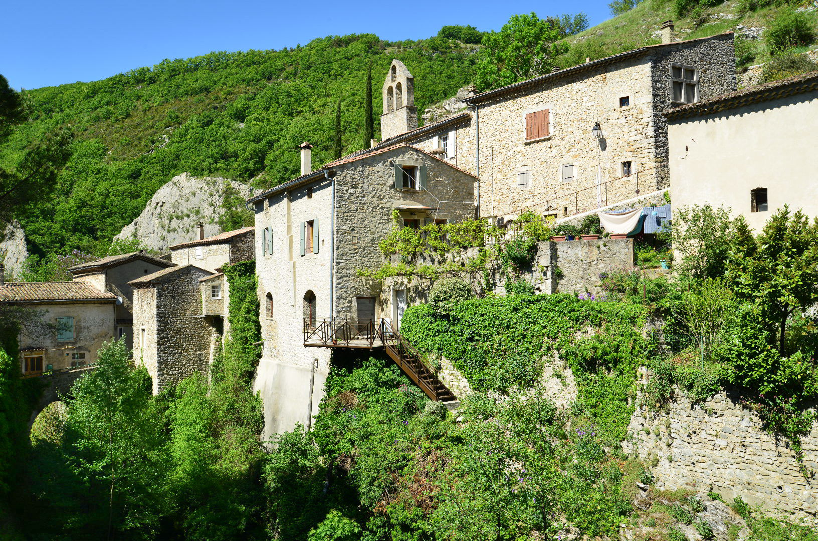 le village de Rochebaudin